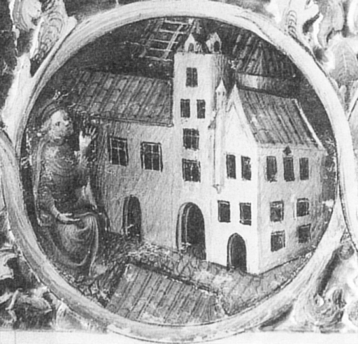 Universität Wien: Collegium ducale rechts Vorlesung der theologische Fakultät Miniatur